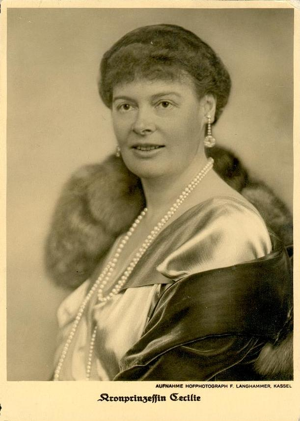 Kronprinzessin Cecilie zu Mecklenburg